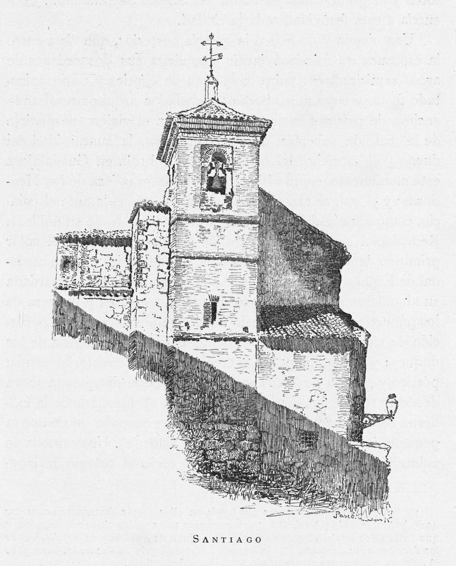 Iglesia de Santiago, en Guadalajara.